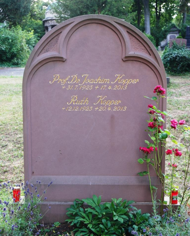 Grab des Philosophen Joachim Kopper, 1925-2013, auf dem Hauptfriedhof Mainz